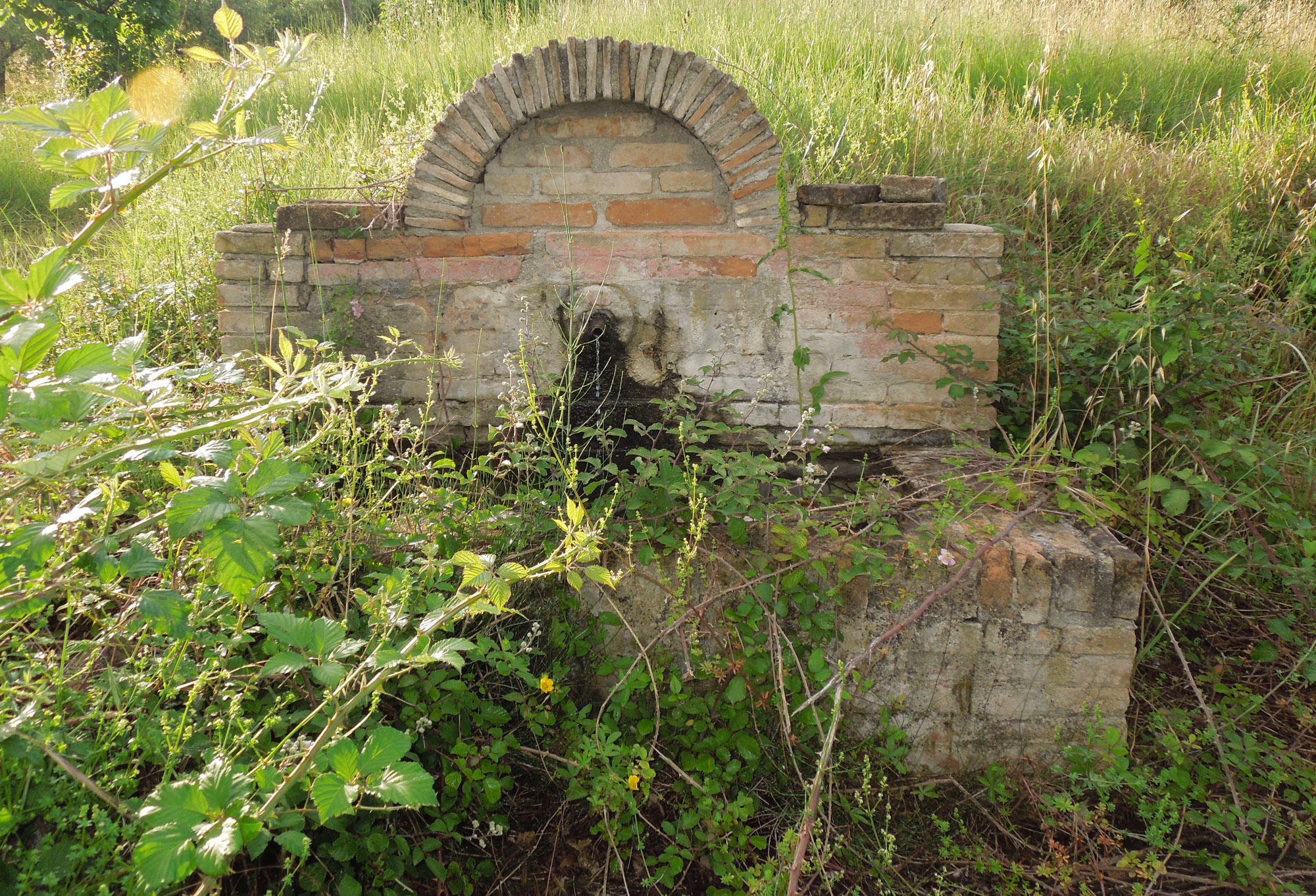 Immagine diurna di Fonte del Latte di Teramo.